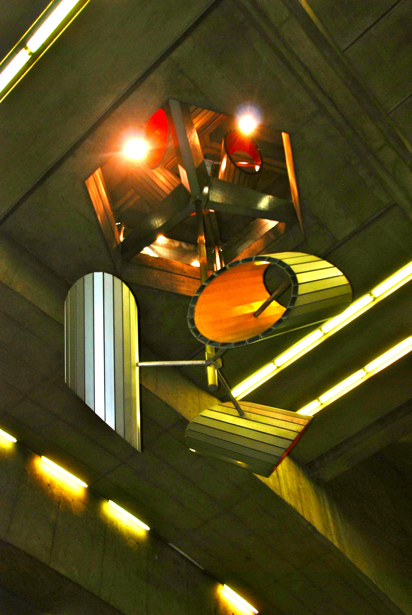 Jacques de Tonnancour, Sculpture motorisée, Station de métro Place Saint-Henri, Collection d'art public du métro de Montréal, Montréal. Crédits photographiques : Marie-Josée Vaillancourt